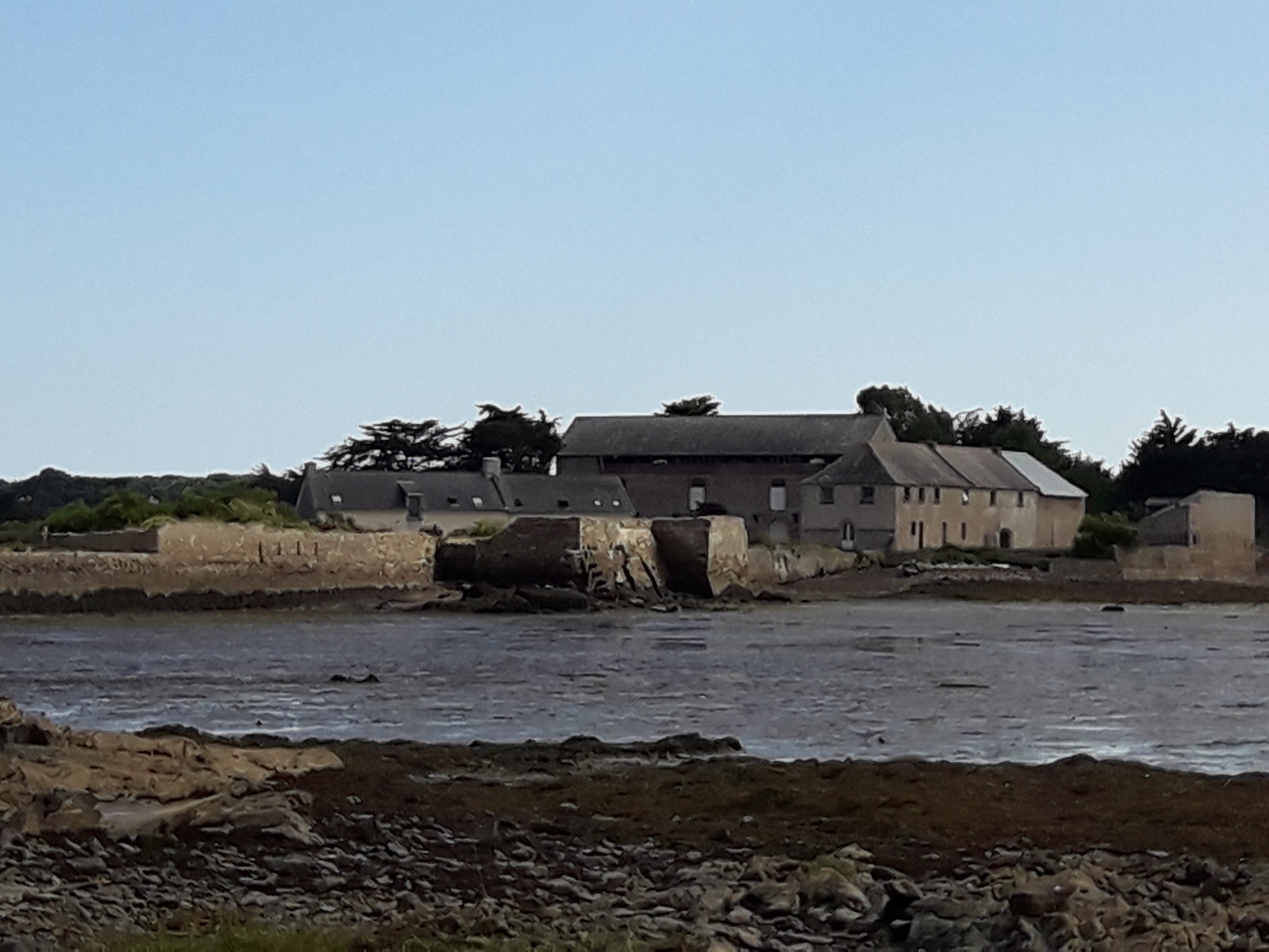 Les ruines de l'ancien moulin à marée de Ludré sont au premier plan